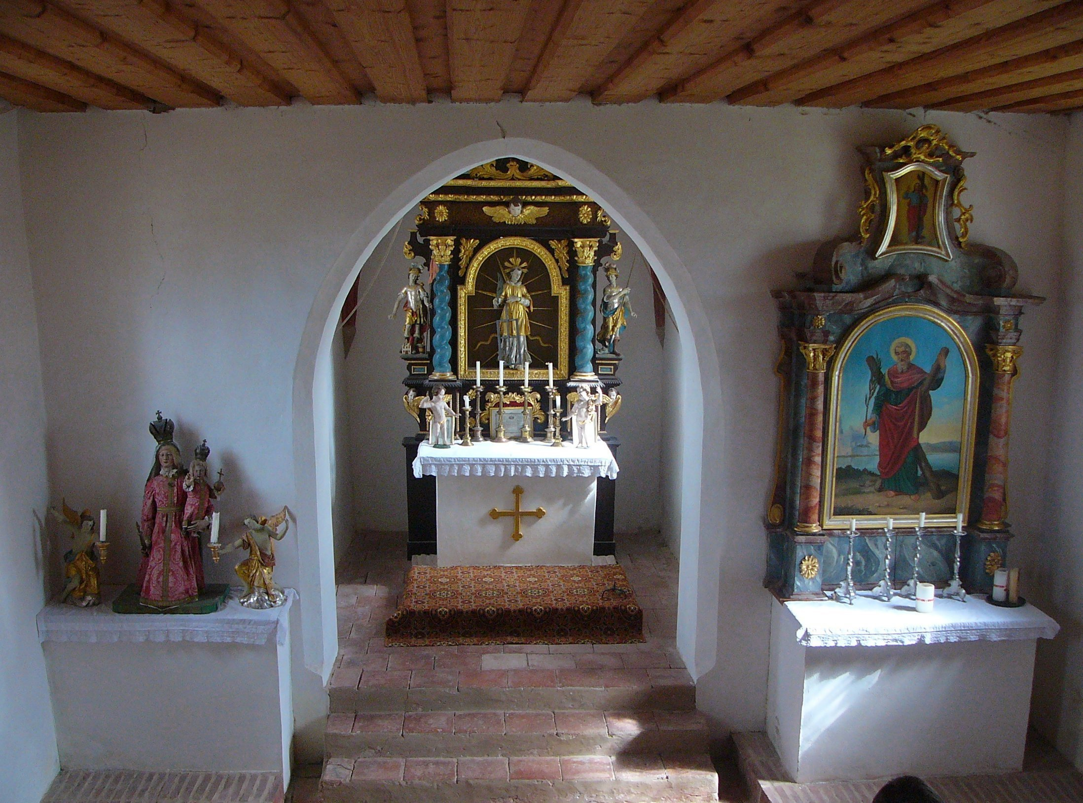 Berndorf. In der St.-Laurentius-Kapelle.This is a photograph of an architectural monument.